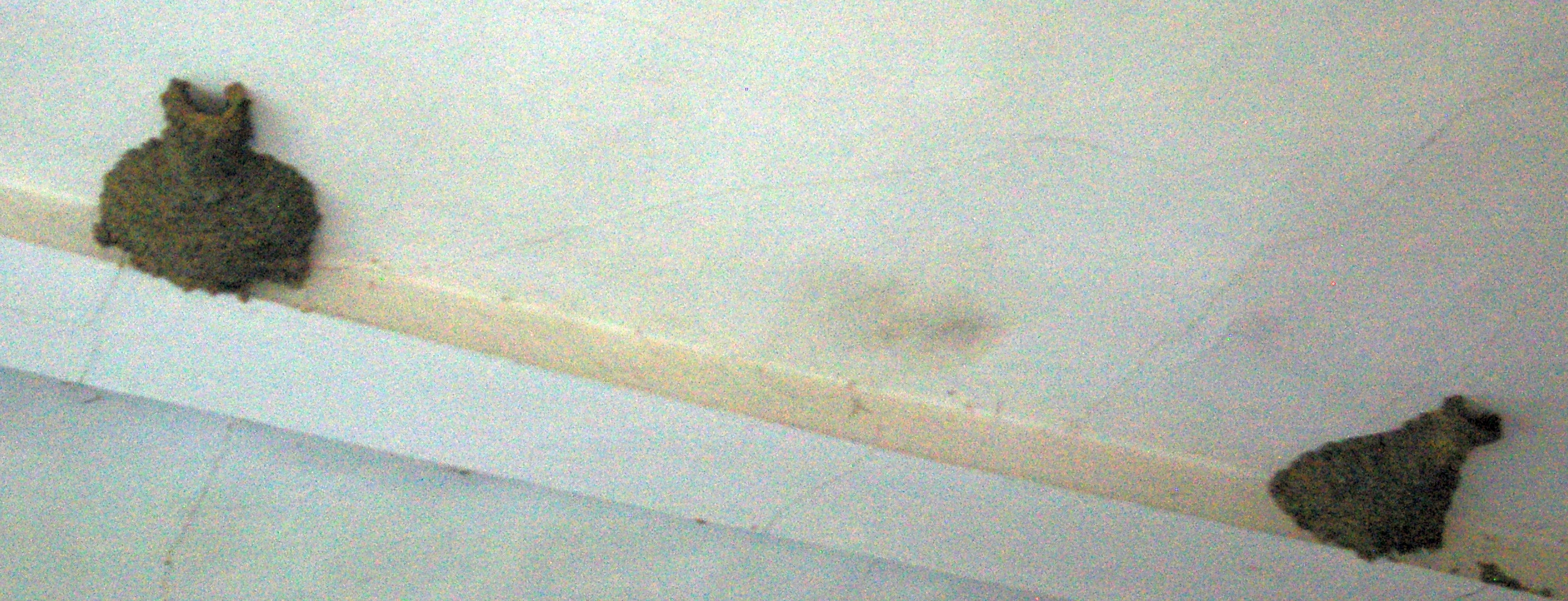 Тревненско, село Маневци на тавана на изоставено читалище, септември 2018